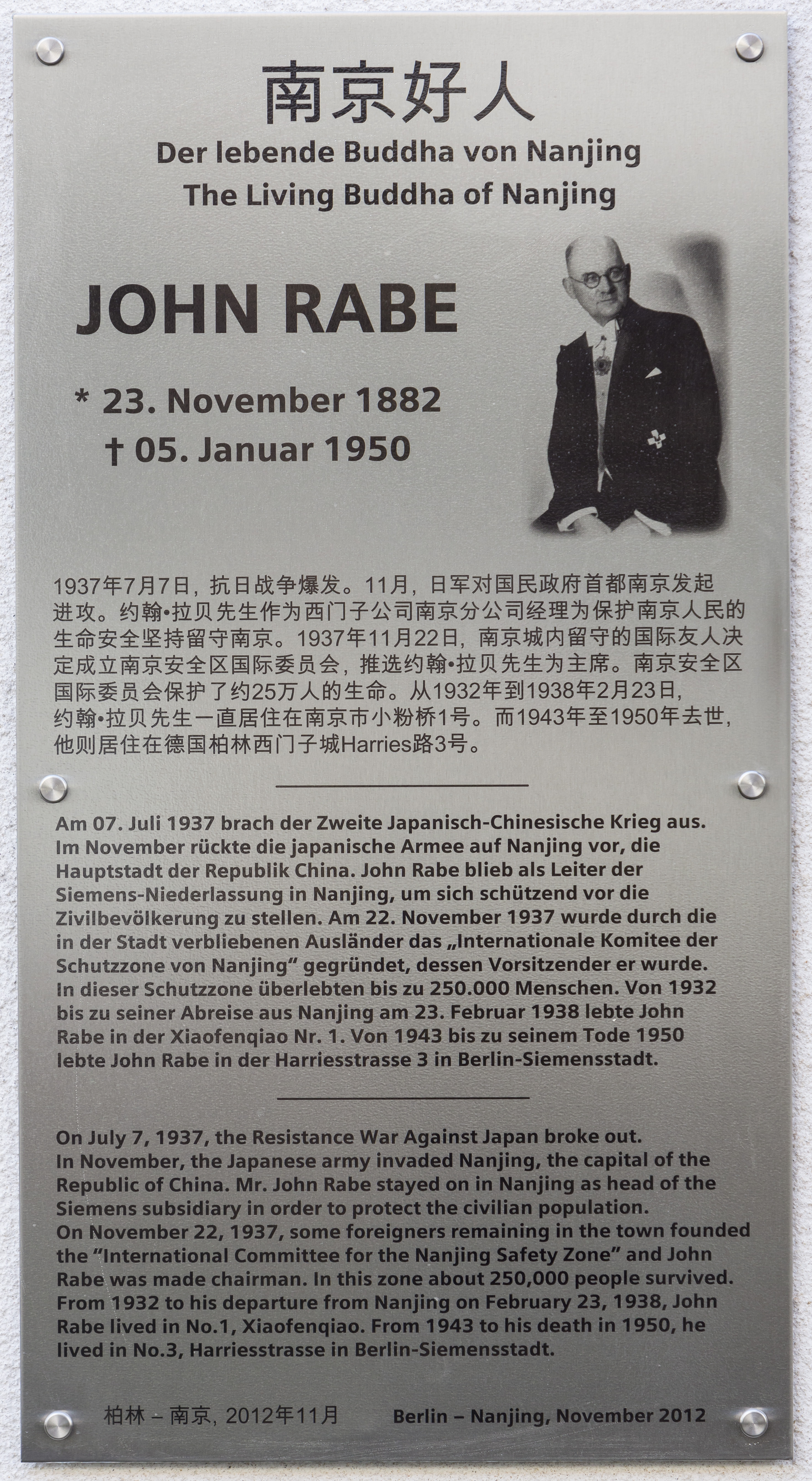 Inschrift der Gedenktafel